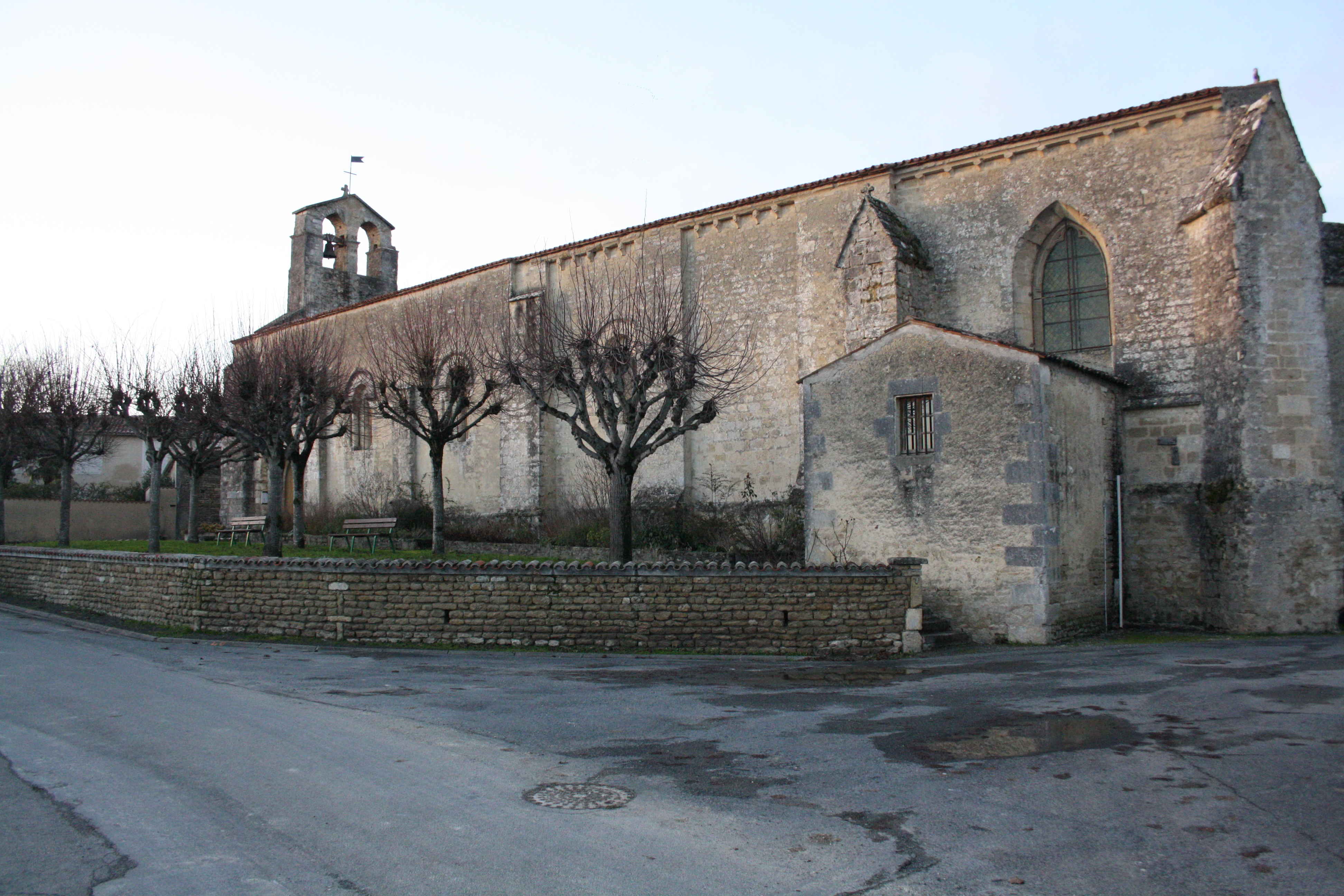 Eglise Saint-Nazaire à Bernay, commune de Bernay-Saint-Martin (Charente-Maritime, France).